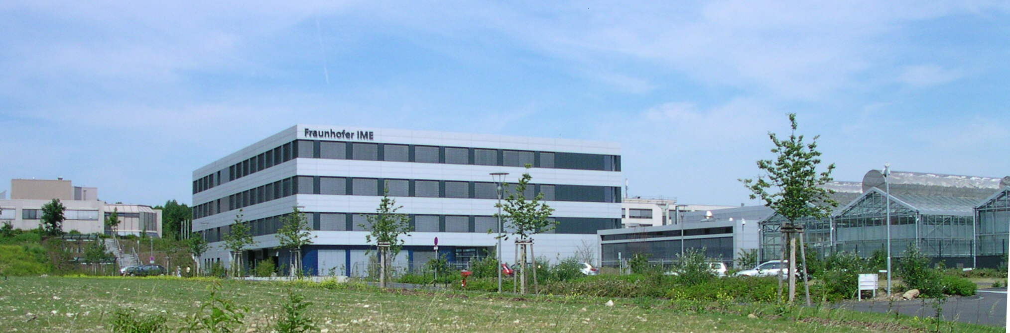 Aachen, Fraunhofer-Institut für Molekularbiologie nd angewandte Ökologie